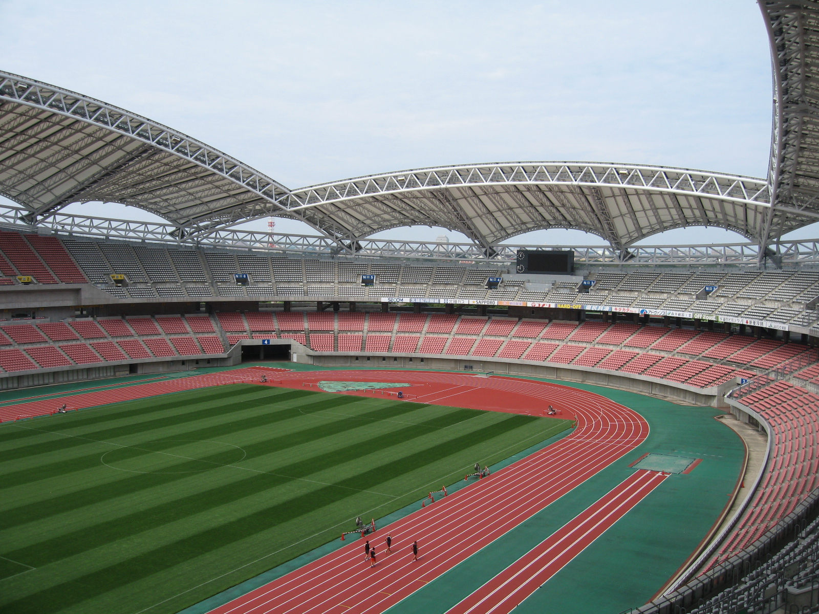 新潟市中央区。新潟スタジアム、陸上トラックの改修を終えた直後のグラウンド。